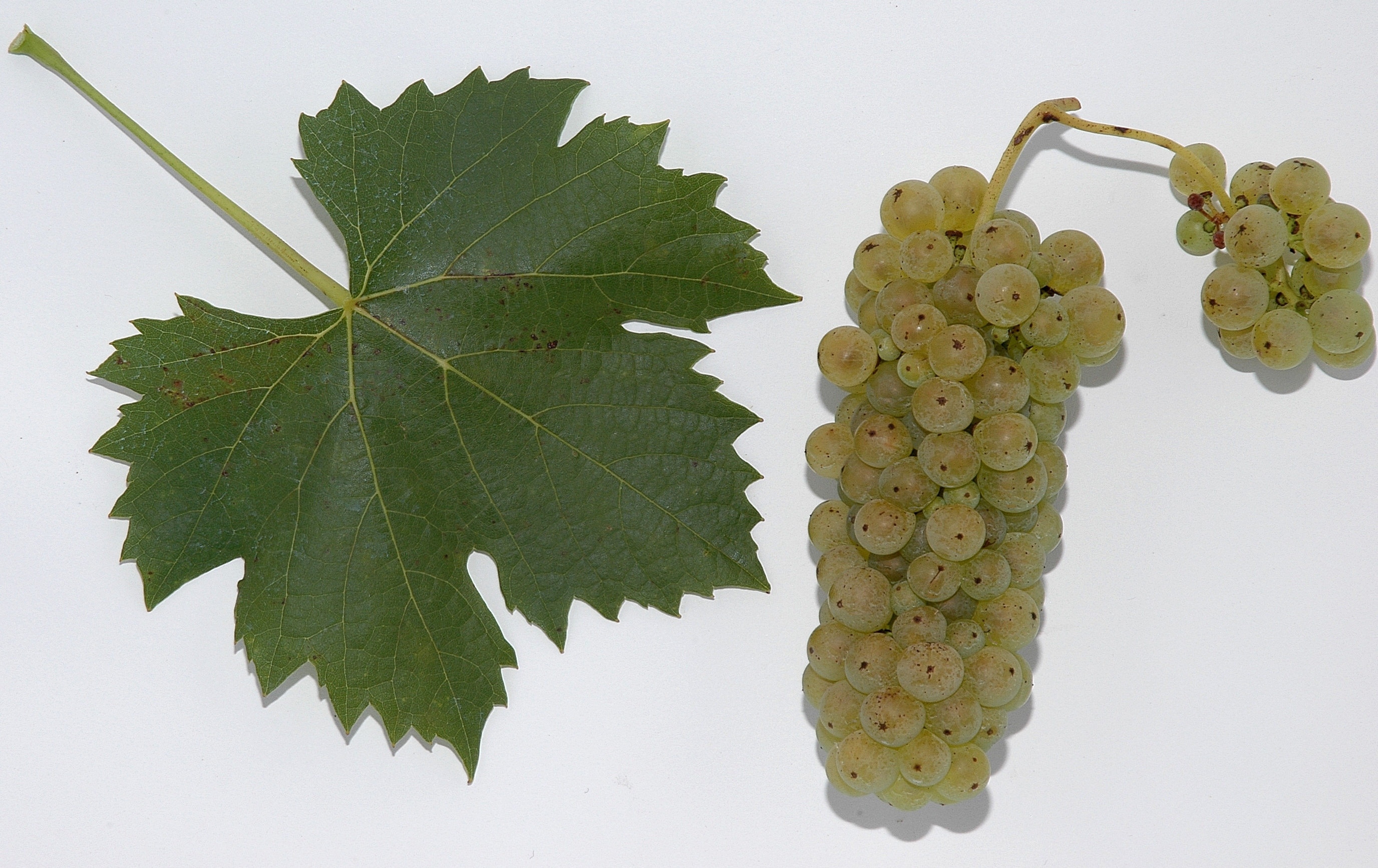 Welschriesling